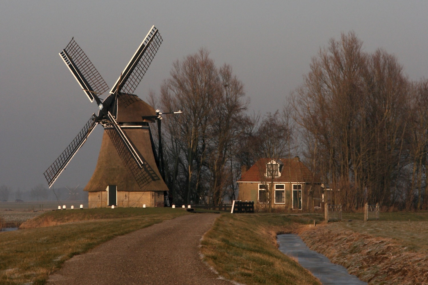 Dronrijp: molen De Poelen / De Puollen